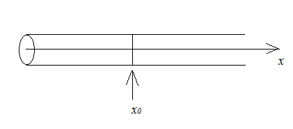 Tubulação com uma quantidade de sal introduzida em x0